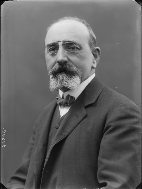 Sebastiano Del Buono fotografato da Mario Nunes Vais